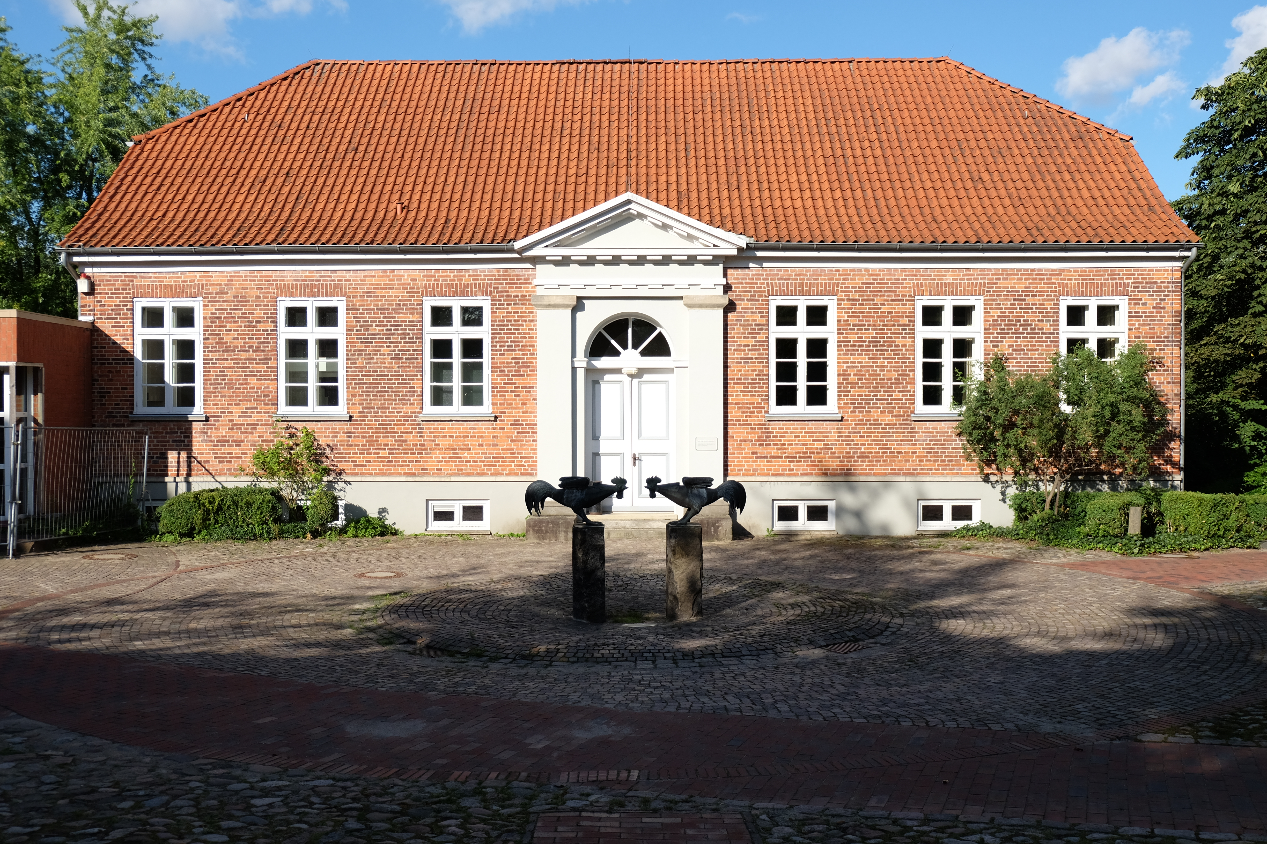 Am Kalkberg 18, Amtsgericht Bad Segeberg, Altbau